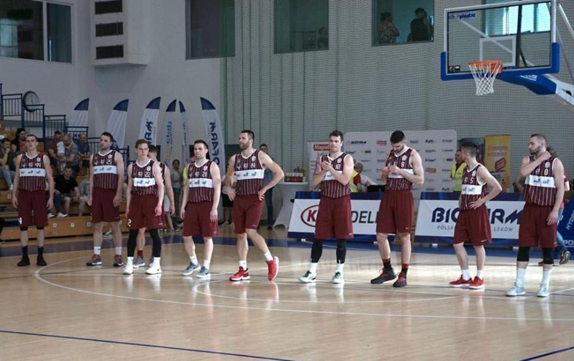 Prezentacja - Spójnia Stargard w Poznaniu (21.04.2018)